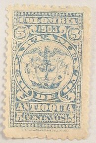 Antioquia stamp